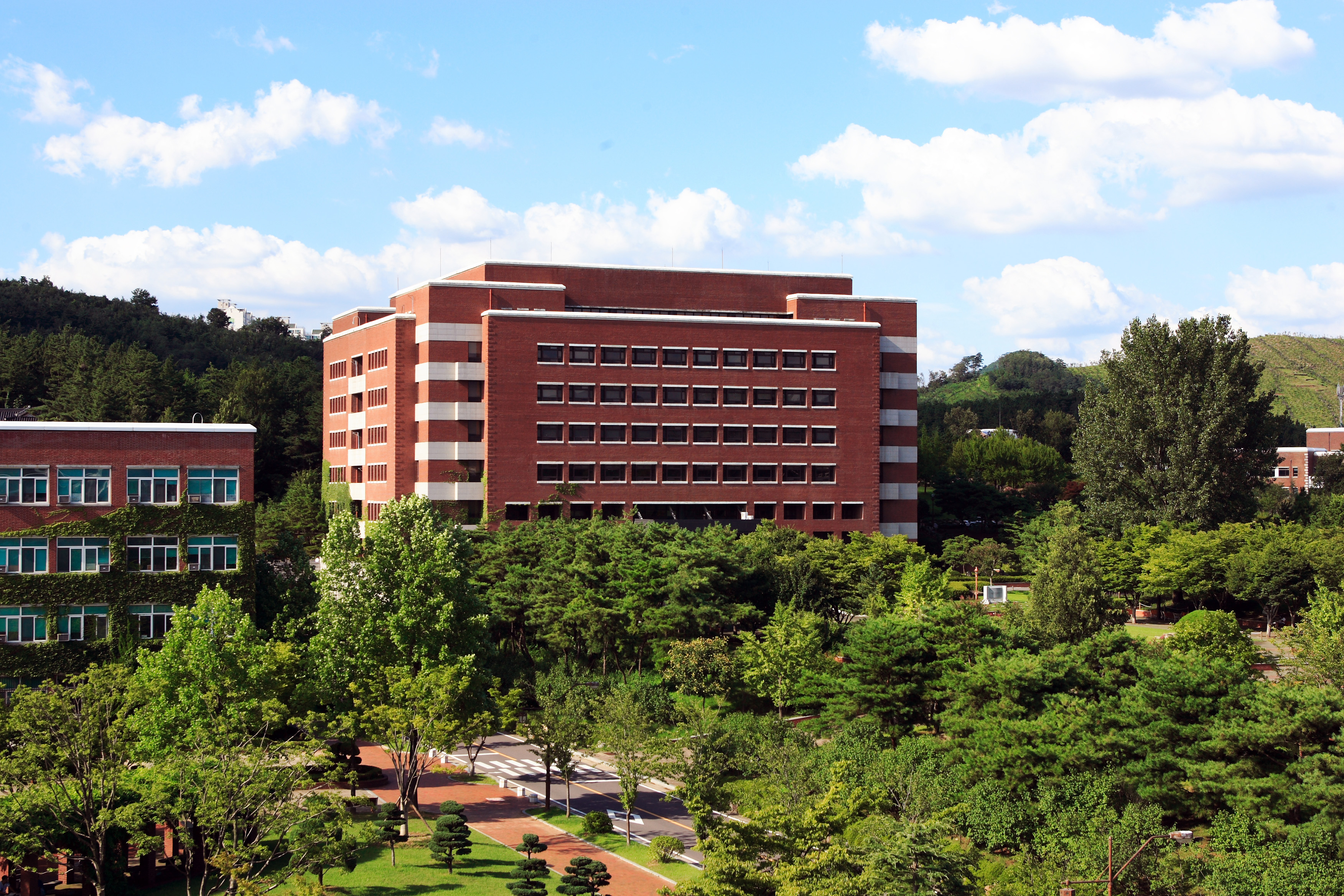 계명대학교 동산도서관